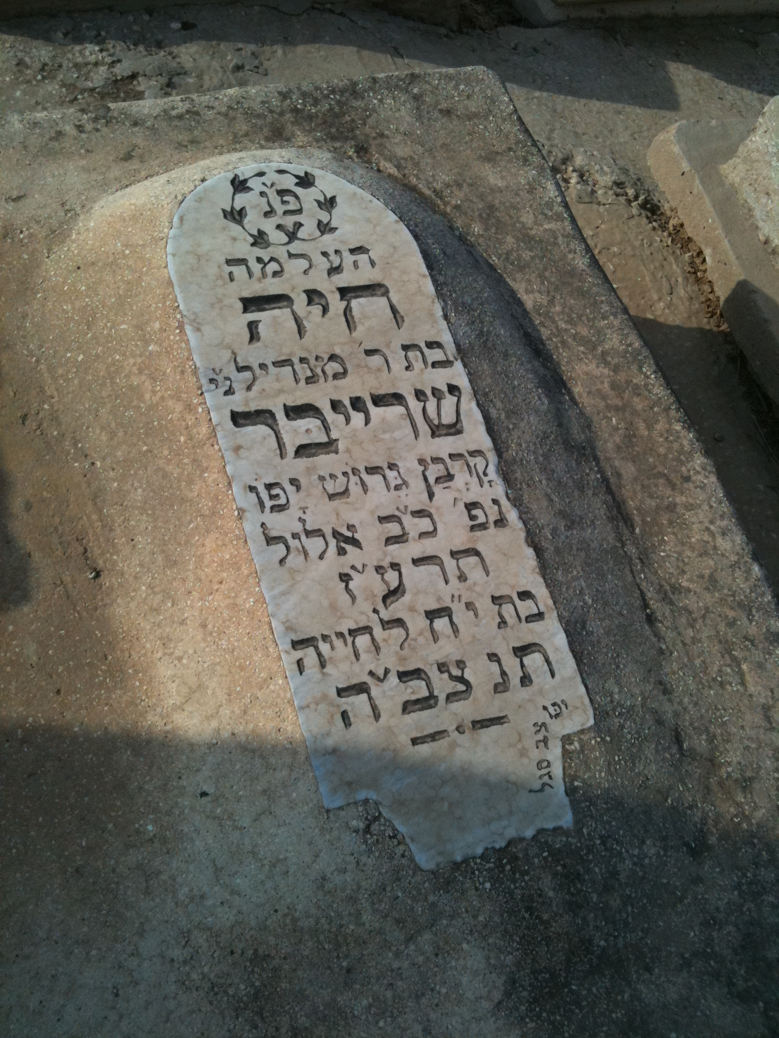 מצבה בבית העלמין סגולה בפתח תקווה. חיה שרייבר - "קרבן גירוש יפו" - נפטרה בשנת 1917 בהיותה בת 18